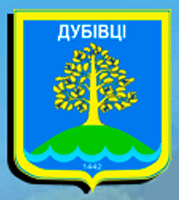 Герб с. Дубівці (Галицький район)